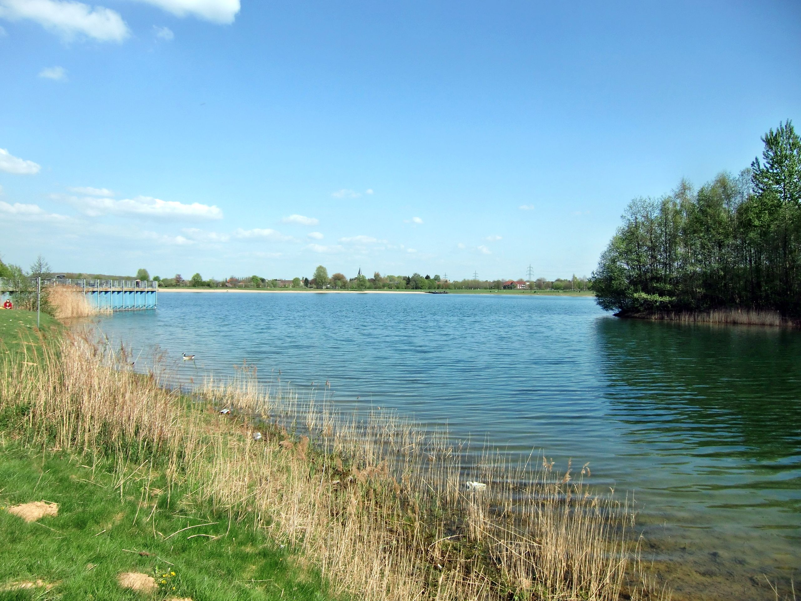 Horstmarer See